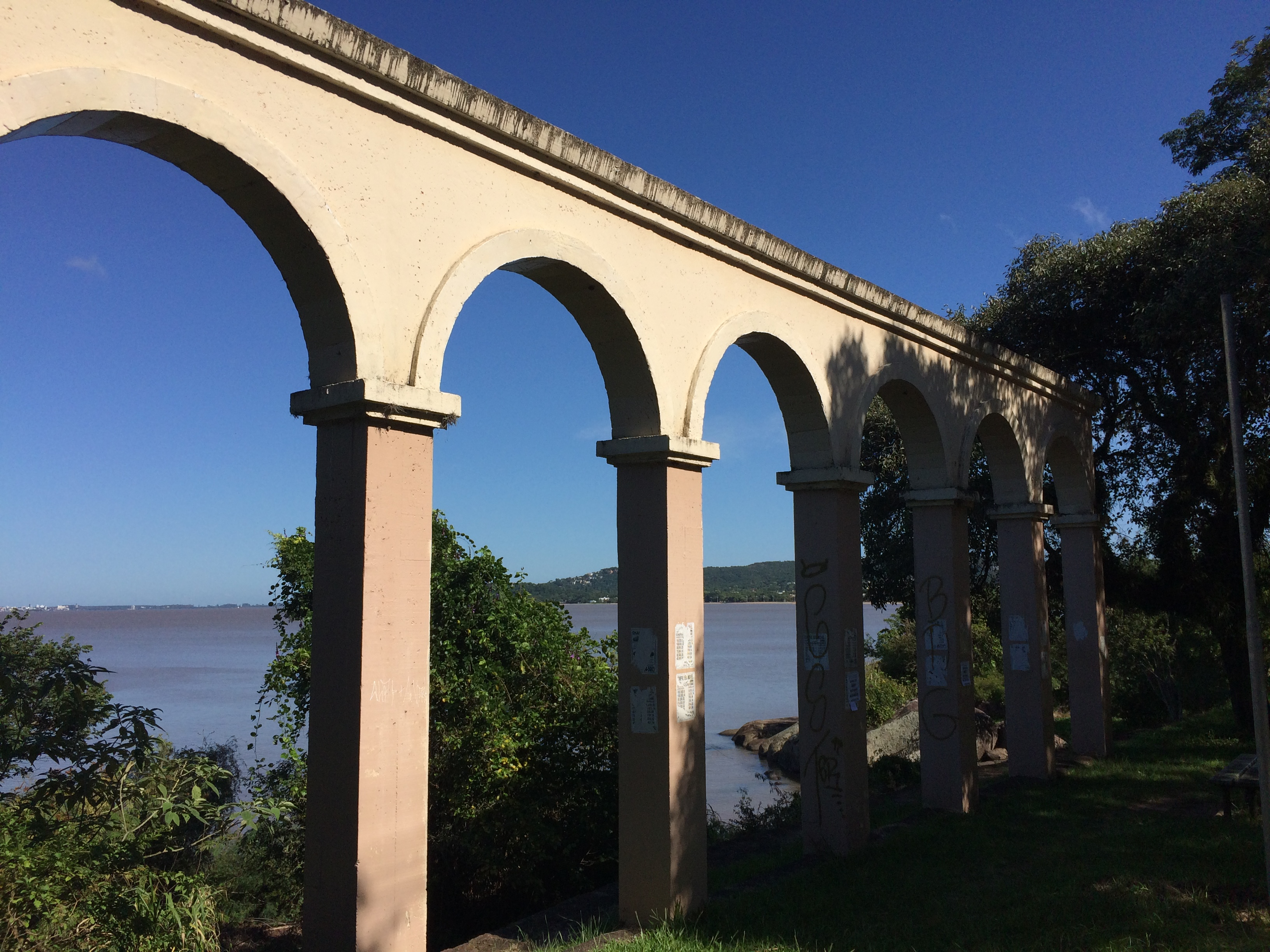 Arcos de Ipanema, junto à Orla do Guaíba, no Bairro Espírito Santo, em Porto Alegre.